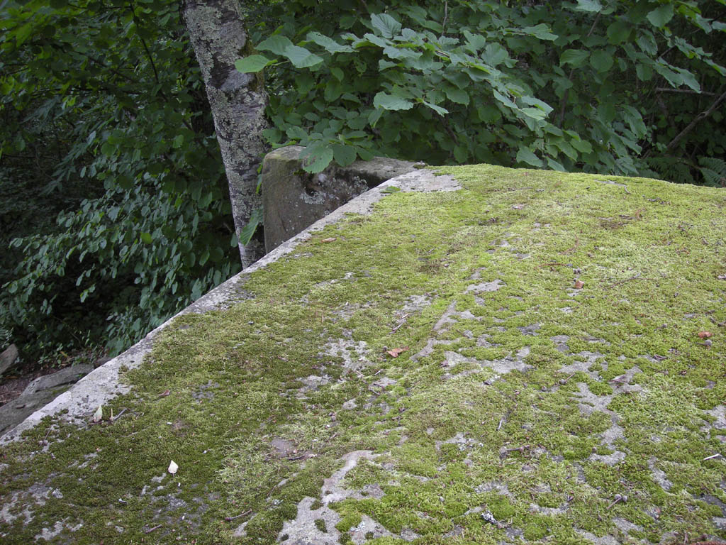 Вытес для укладки плиты приставной крыши на крыше плиточного дольмена со стороны его фронтона. Сама плита упала (налево) вниз. На снимке также видна целой одна из двух вертикально стоящих оригинальных подпорок упавшей плиты. Дольменная группа долины реки Аше.